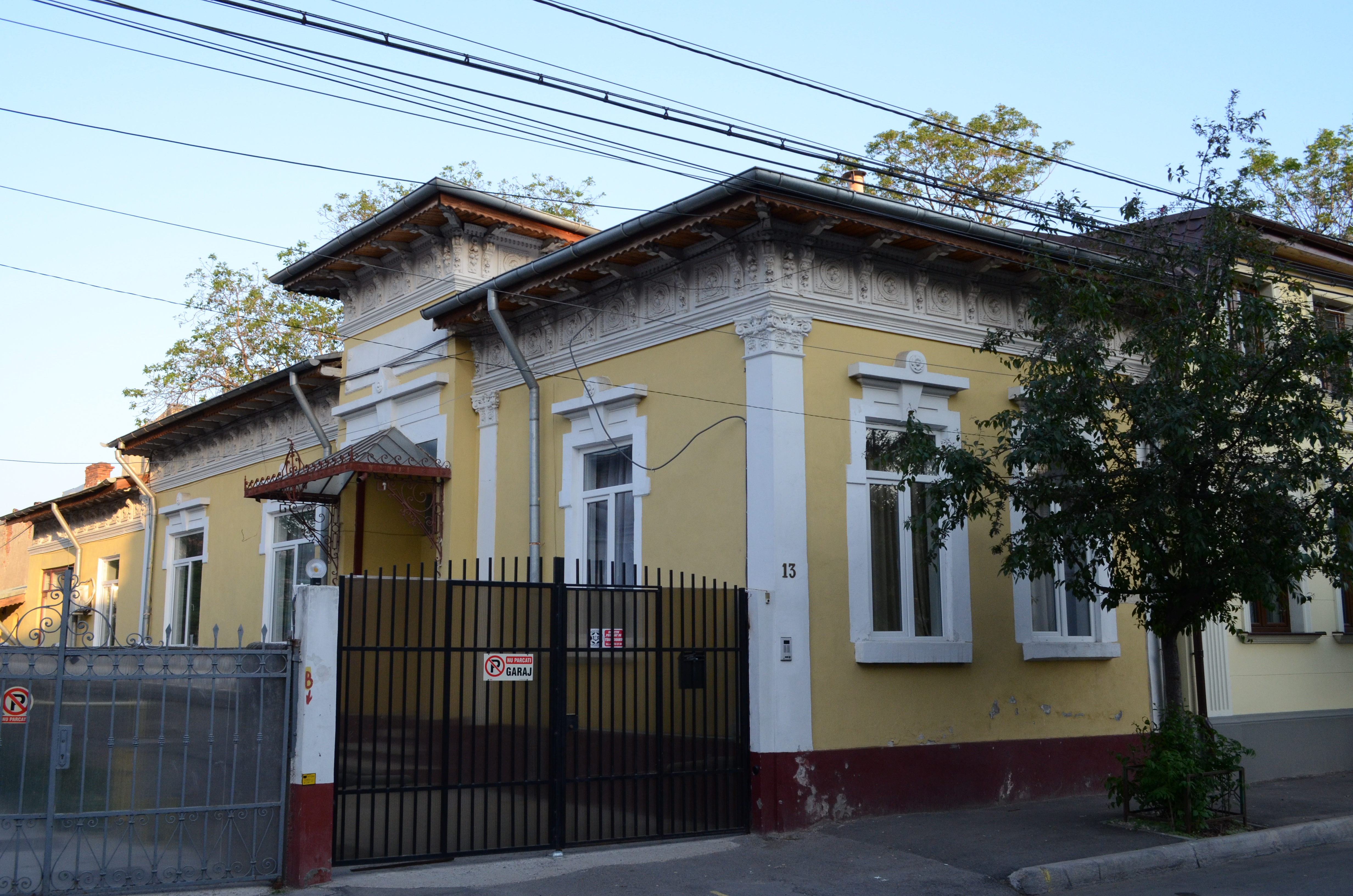 Casă, Strada Parfumului nr. 13, Sector 3, București